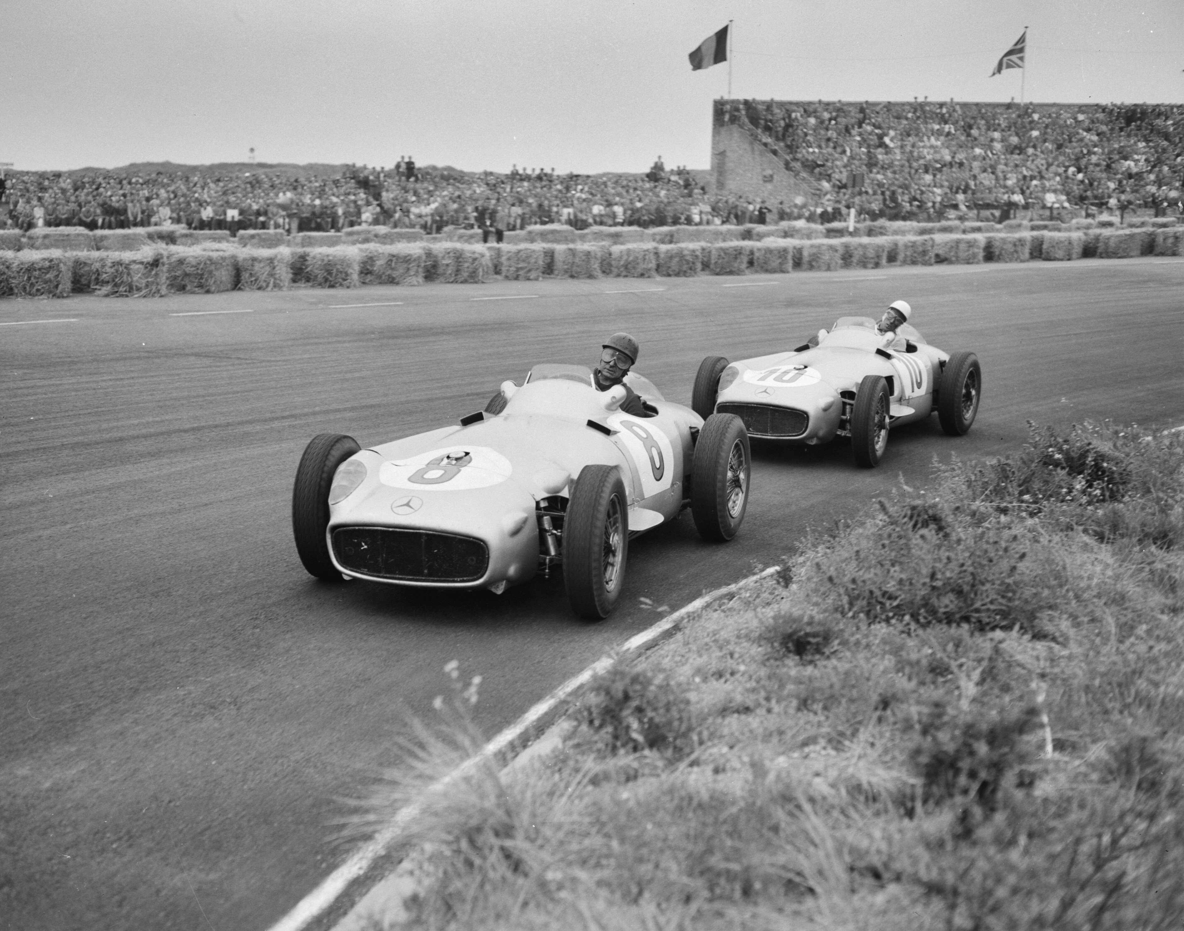 Collectie / Archief : Fotocollectie Anefo Reportage / Serie : [ onbekend ] Beschrijving : Grote Prijs van Nederland Zandvoort Datum : 19 juni 1955 Locatie : Noord-Holland, Zandvoort Persoonsnaam : Grote prijs van Nederland Fotograaf : Pot, Harry / Anefo Auteursrechthebbende : Nationaal Archief Materiaalsoort : Negatief (zwart/wit) Nummer archiefinventaris : bekijk toegang 2.24.01.04 Bestanddeelnummer : 907-1904